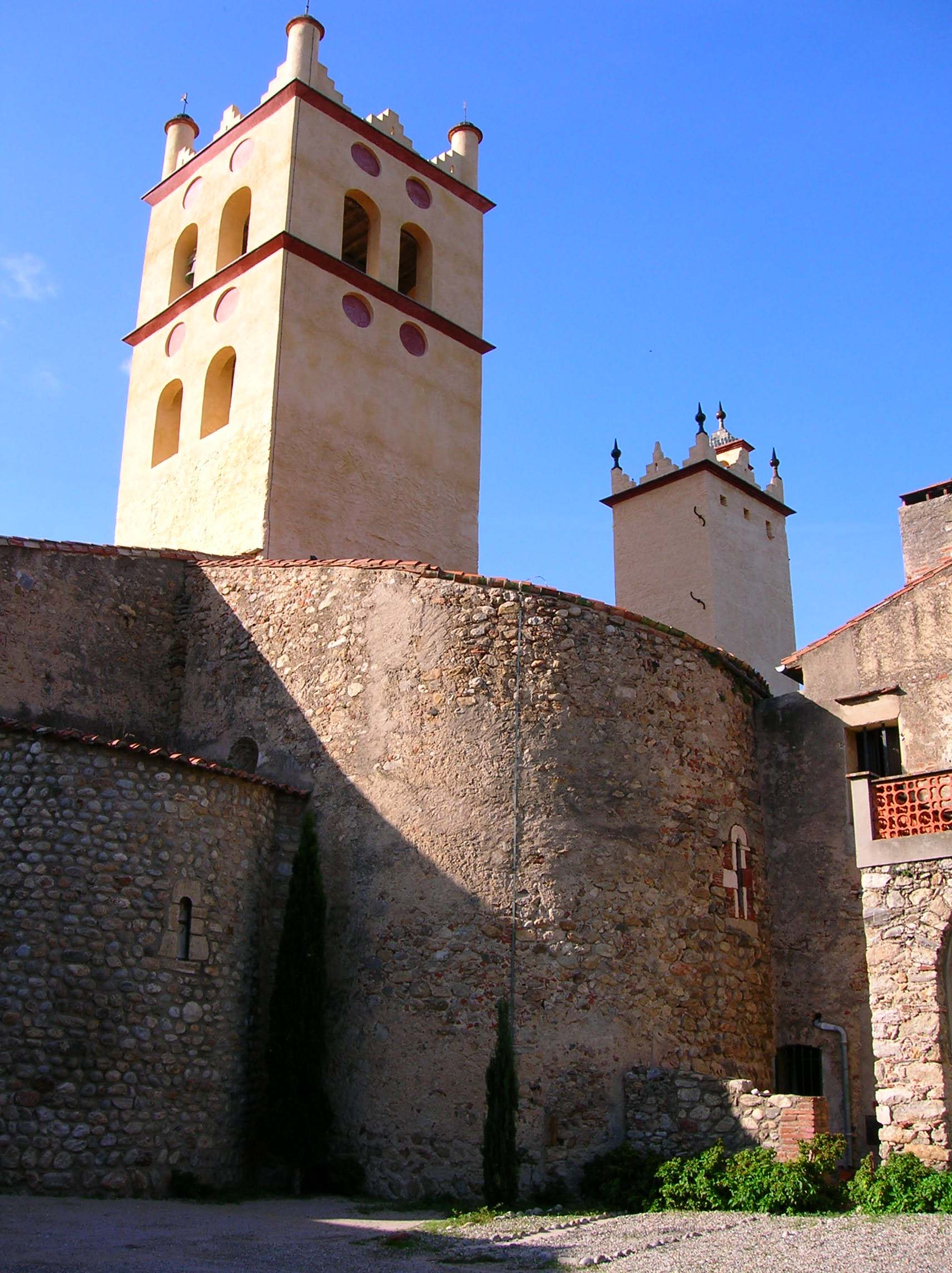 Vue du chevet et des clochers de l'église abbatiale de Saint-Génis-des-Fontaines. Photographie personnelle (Octobre 2006).